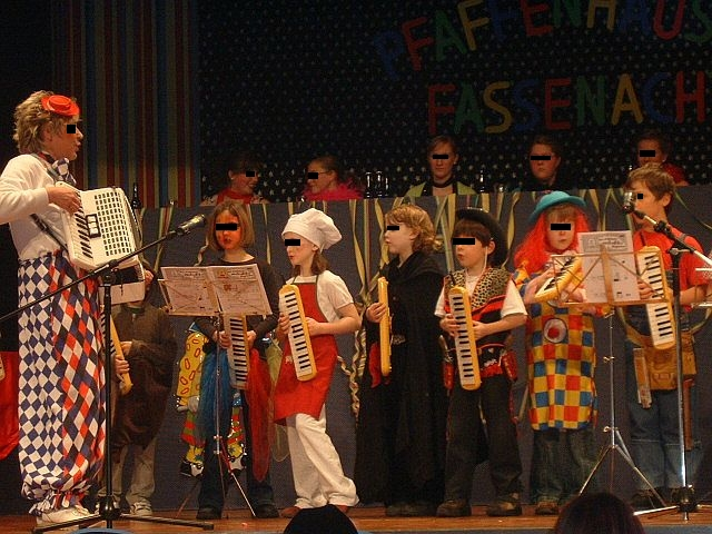 Kinder einer Musikgruppe in Deutschland spielen bei einem Faschingsauftritt Melodika